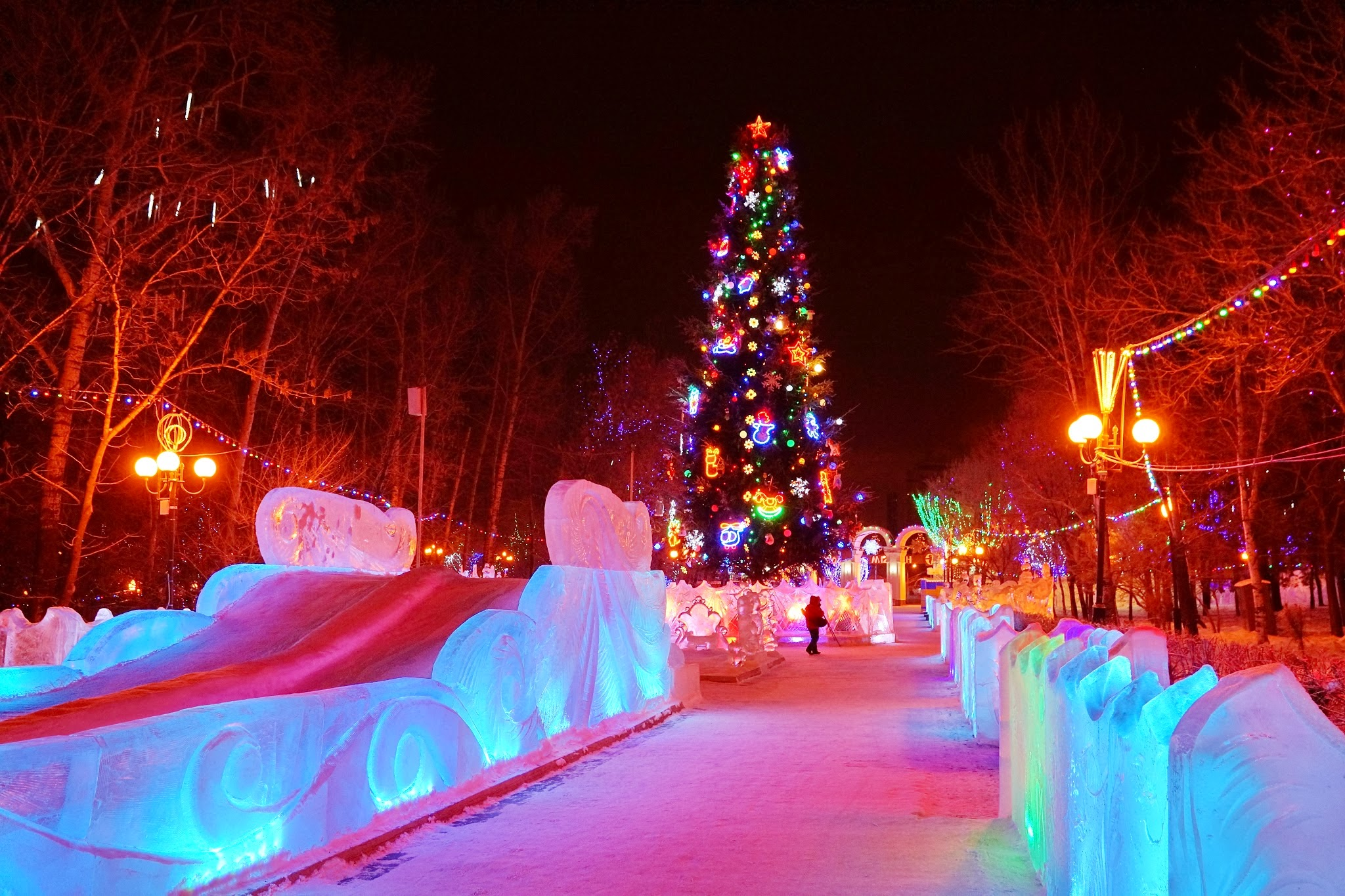 Kirovskiy rayon, Khabarovsk, Khabarovskiy kray, Russia